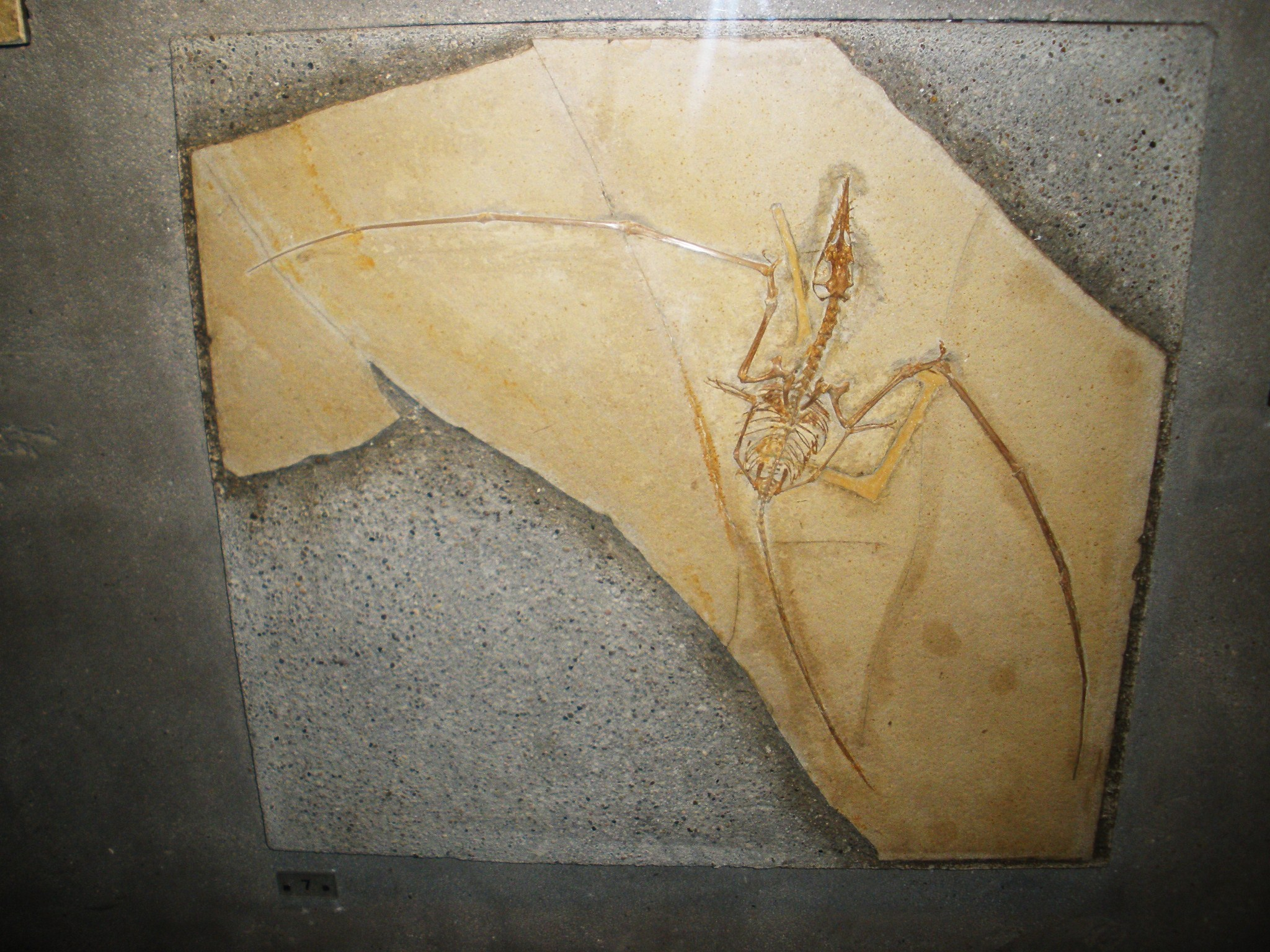 Fossil of Rhamphorhynchus, an extinct pterosaur- Took the photo at Senckenberg Museum of Frankfurt